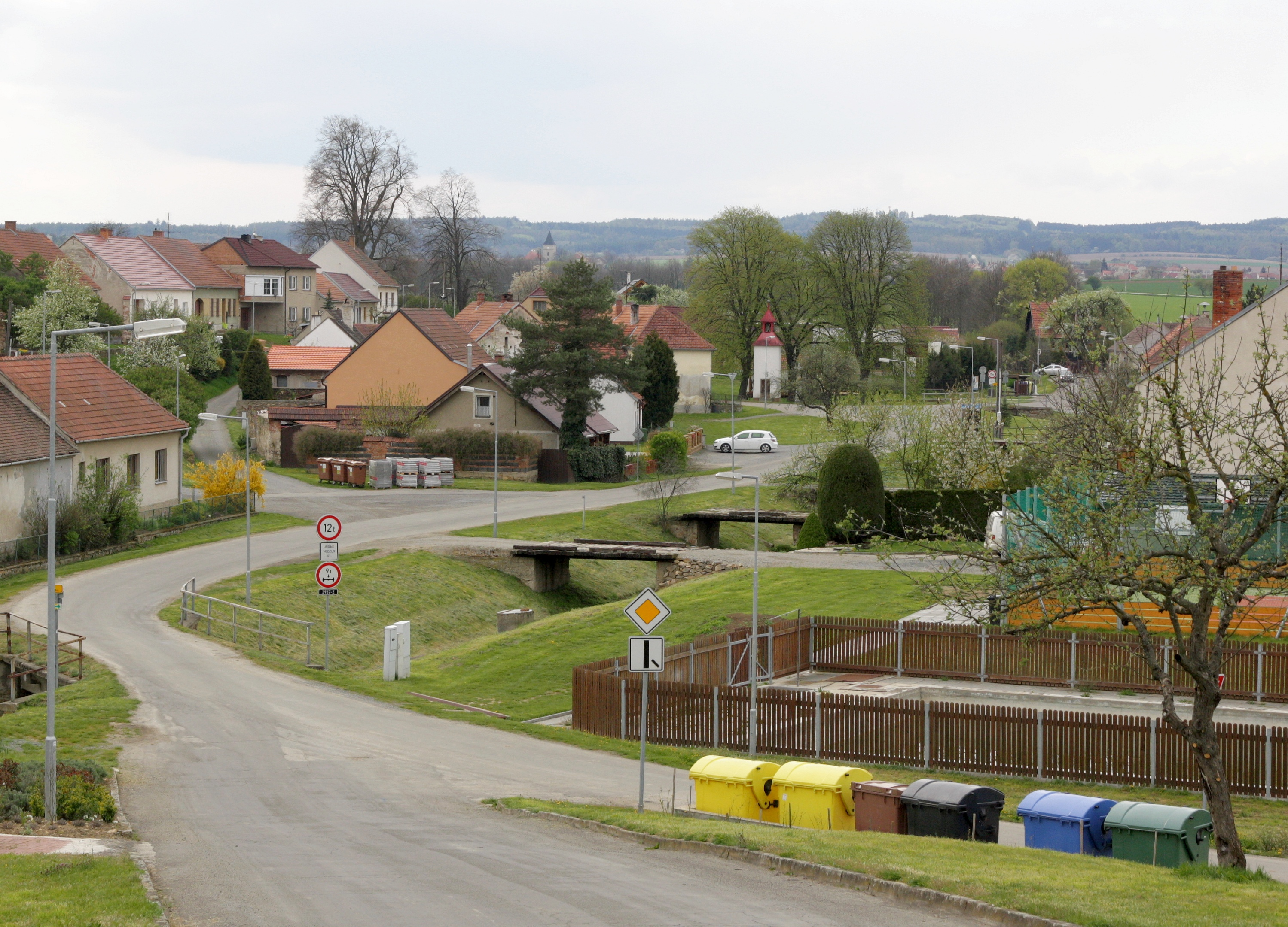 Lhánice - náves od východu.